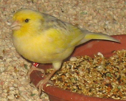 Yellow Serinus hybrid